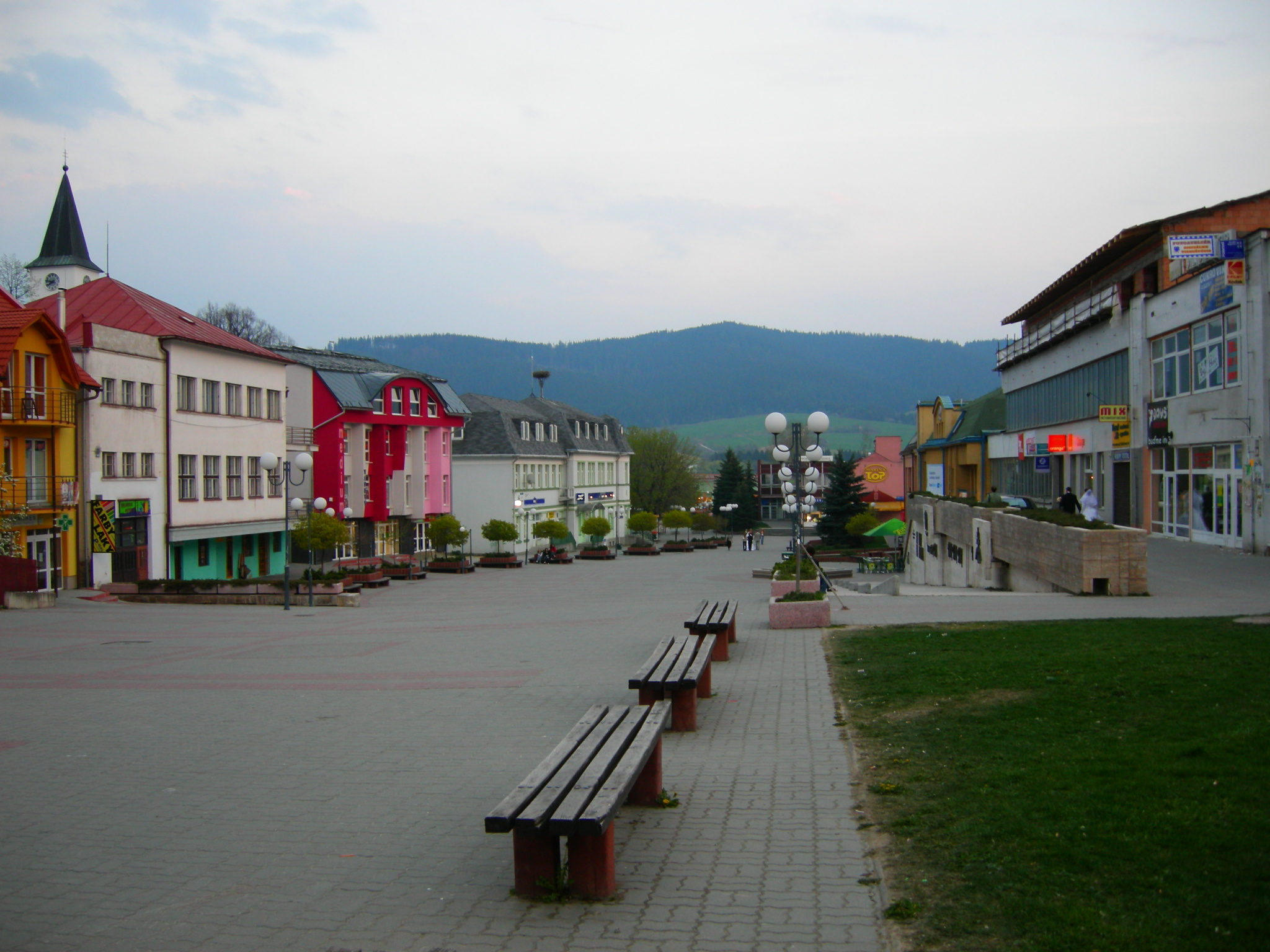 Rynek w orawskim Namiestowie